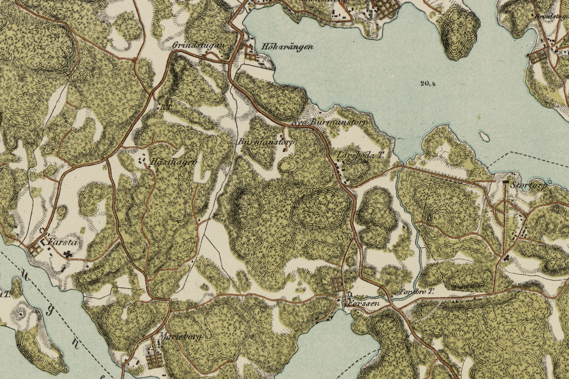 Gårdarna Hökarängen, Larsboda, Burmanstorp, Forsen, Stortorp m.fl. på Topografiska corpsens kartan från 1860-talet